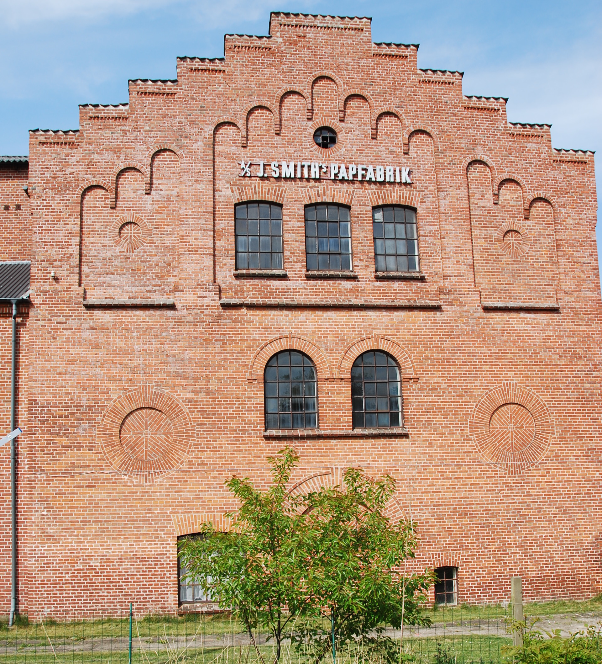 Hovedbygningen på Bruunshaab Gamle Papfabrik i Bruunshaab, ved Viborg. Tegnet af arkitekt Søren Vig-Nielsen.